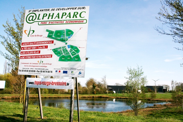 Français